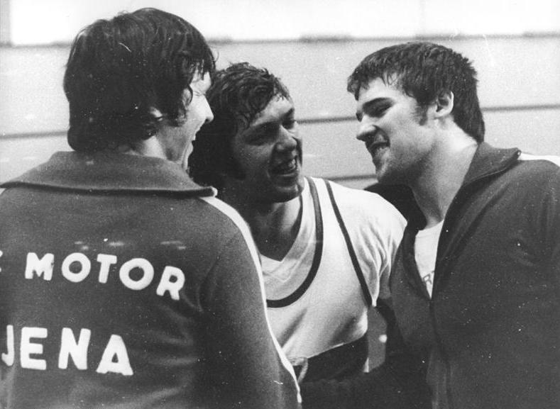 Mathias Schmidt, Gerald Pufe, Rainer Scholz ADN-ZB Demme 25.02.1978-str-Senftenberg: DDR-Hallenmeisterschaften der Leichtathleten-Den Kugelstoßwettbewerb der Männer gewann Mathias Schmidt (SC Motor Jena-M.) mit der Weite von 20,44 m. Nach dem Wettbewerb nimmt er von seinem Mannschaftskameraden Gerald Pufe (l.) und Rainer Scholz (SC DHfK Leipzig) Glückwünsche entgegen.